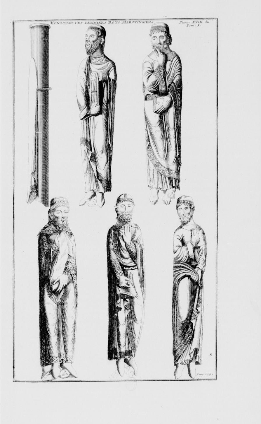 Statues du portail de droite de l'abbatiale de Saint-Denis --- dessin de Bernard de Montfaucon, Les monumens de la monarchie françoise, VOL1.